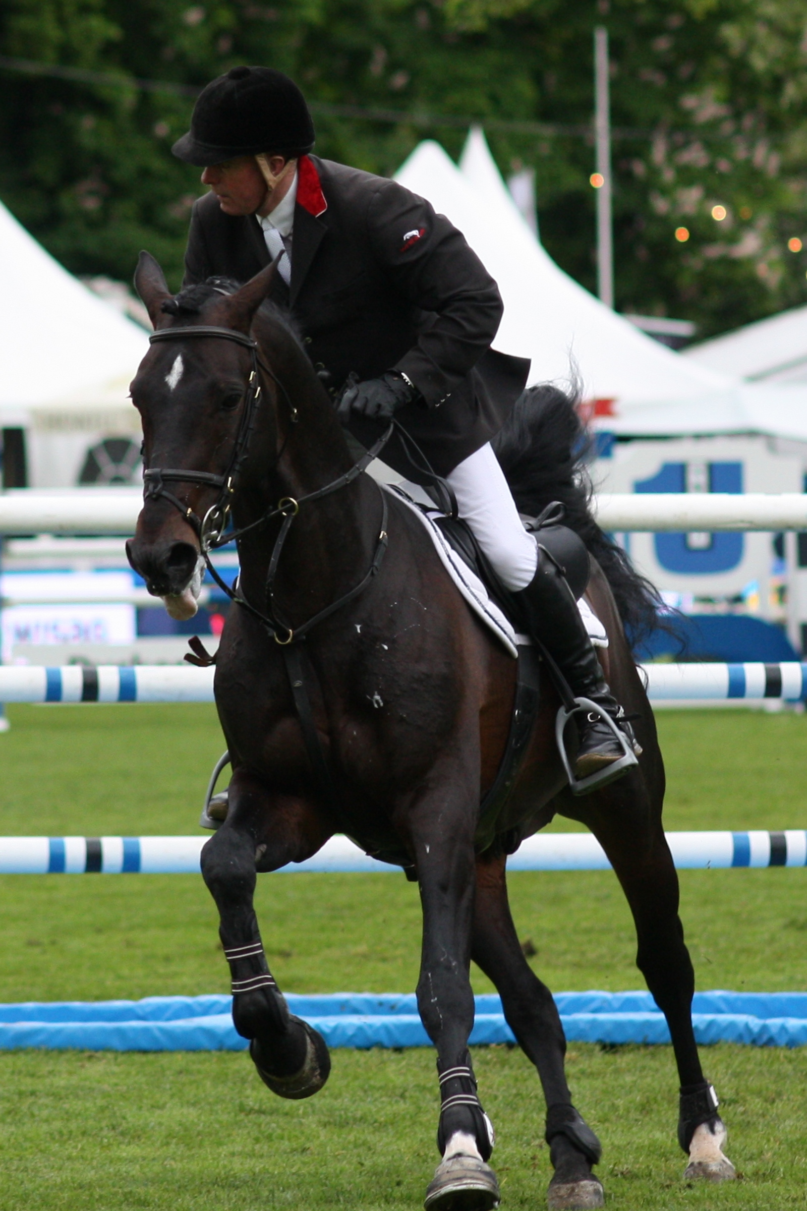 77. Internationanles Wiesbadener Pfingstunier 2013, CSI***** Eröffnungsspringen, John Whitaker auf Argento Personality rights warning Although this work is freely licensed or in the public domain, the person(s) shown may have rights that legally restrict certain re-uses unless those depicted consent to such uses. In these cases, a model release or other evidence of consent could protect you from infringement claims.